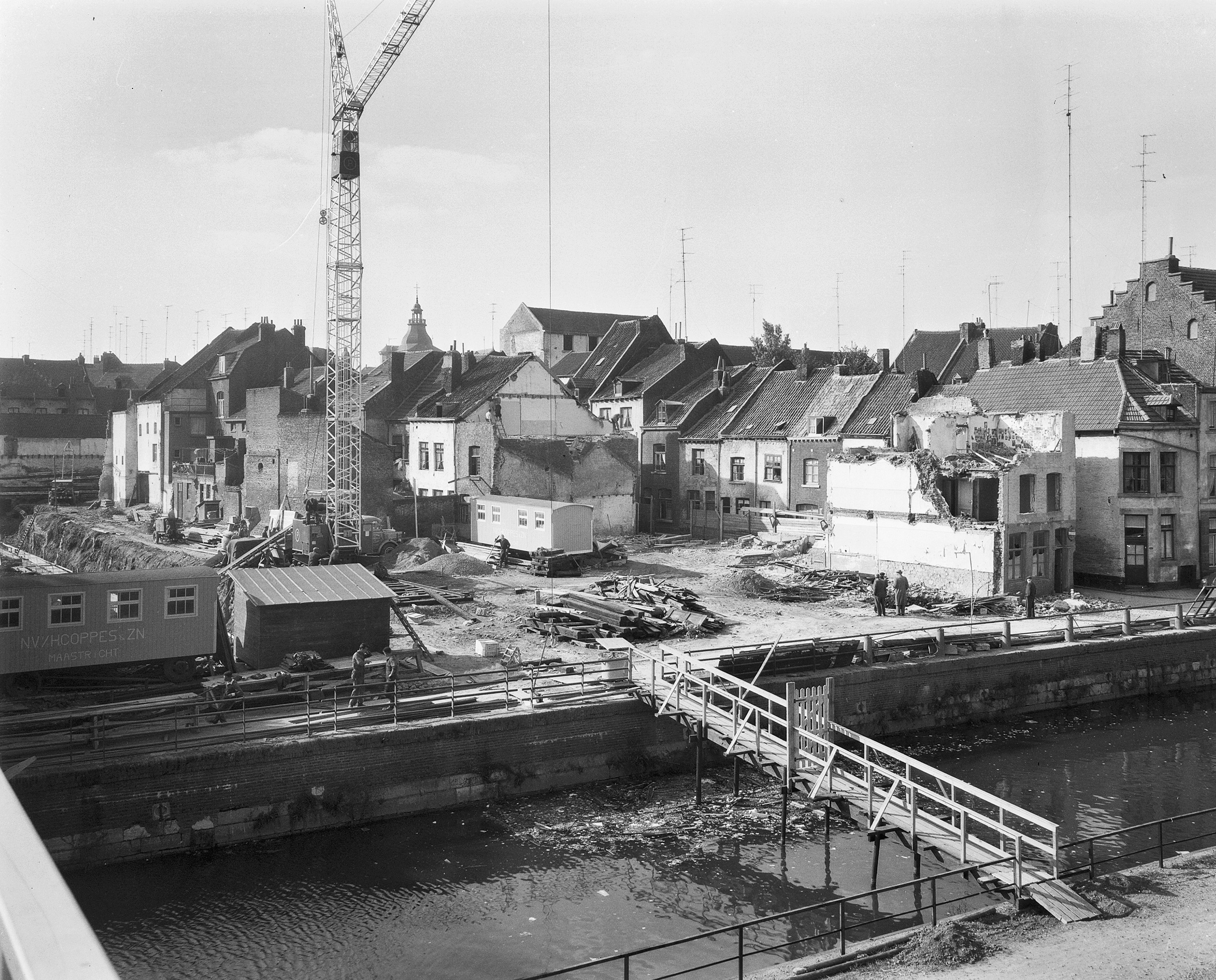 25, overzicht tijdens sloping